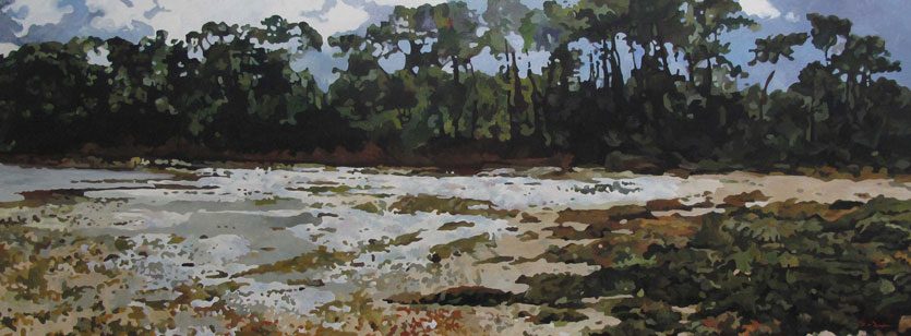 Pont-l'Abbé Ile Chevalier